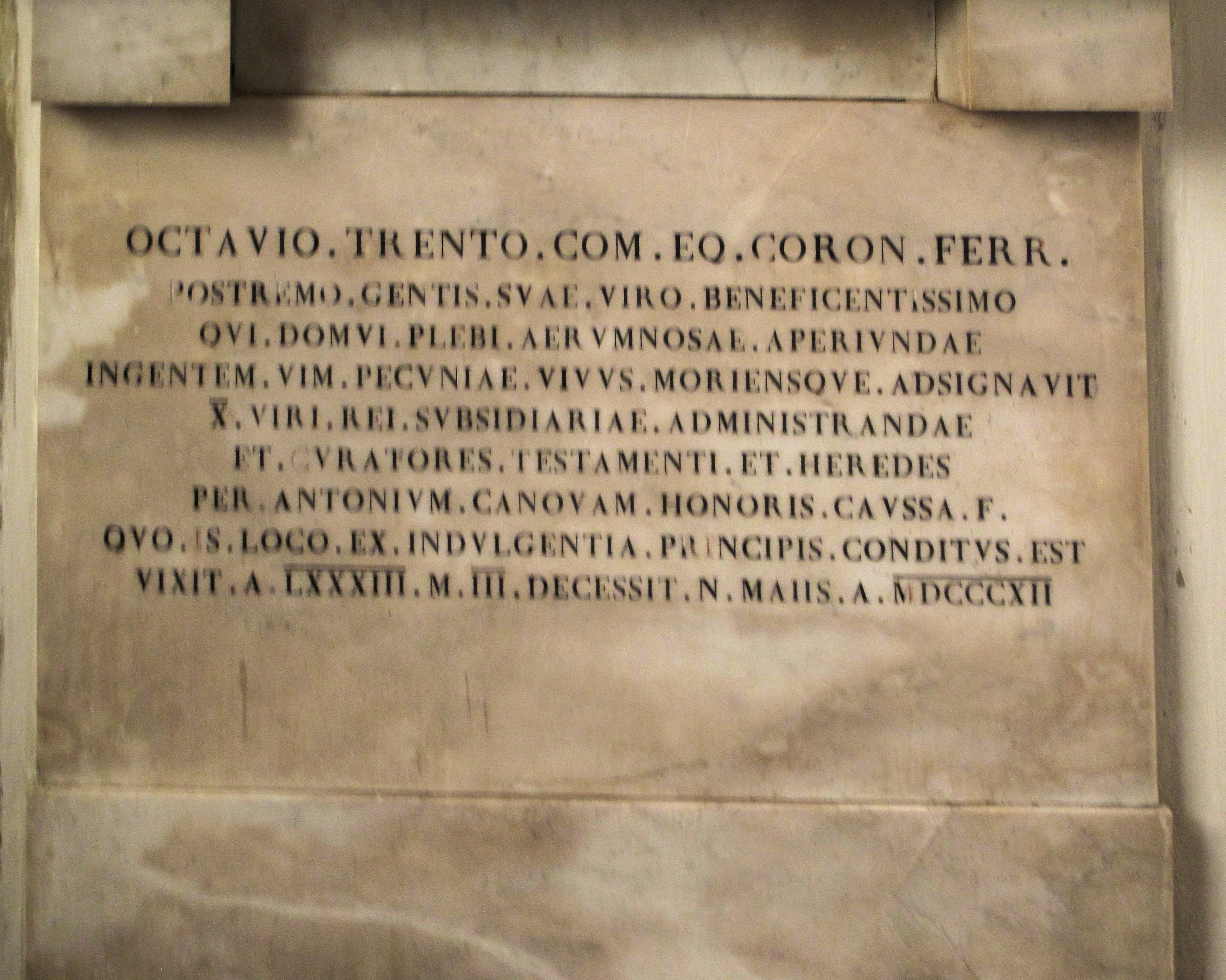 Ottavio Trento - Monumento del Canova